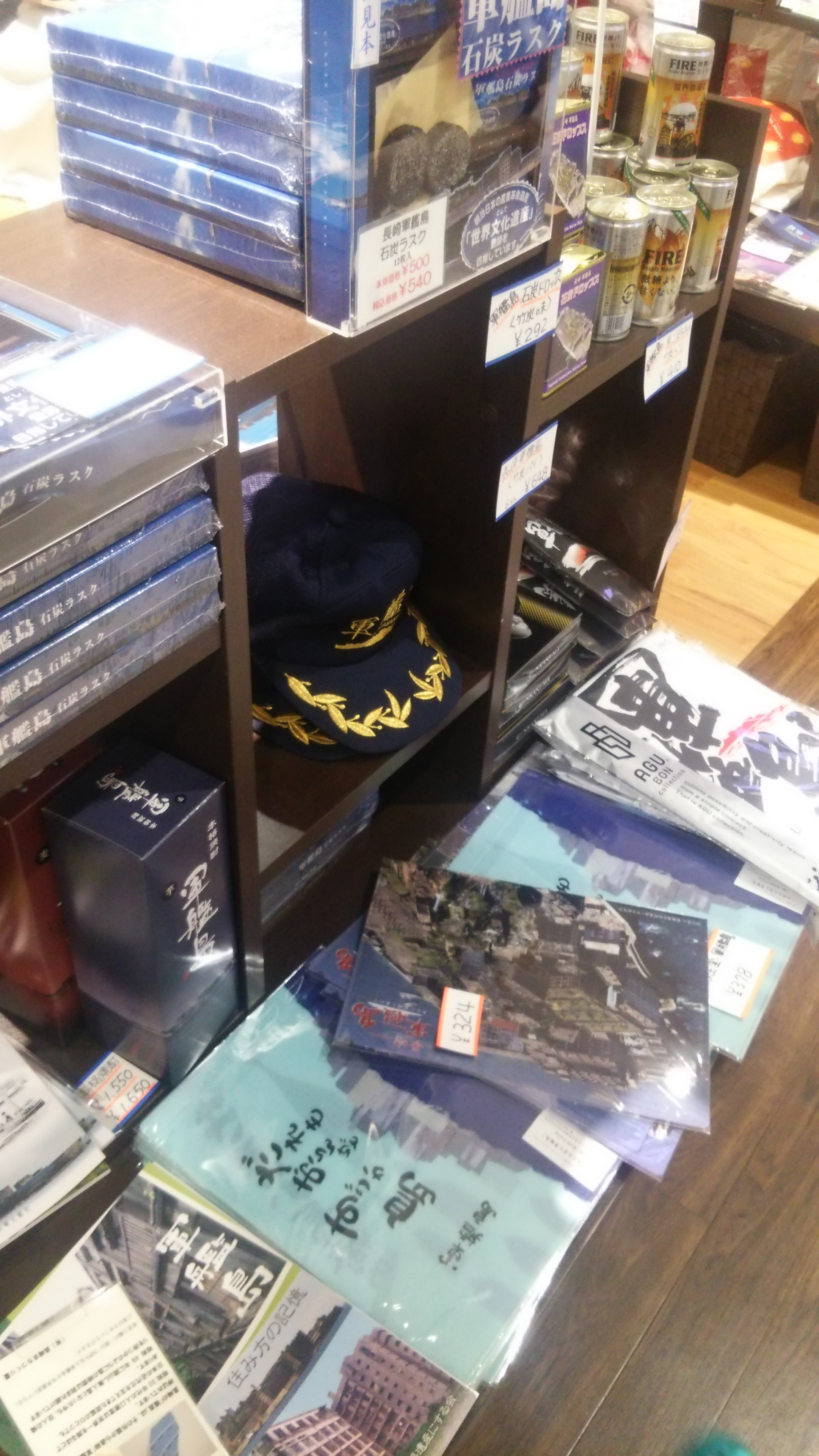 「遺産の商品化」の典型例…世界遺産に登録された軍艦島の関連グッズ土産が並ぶ